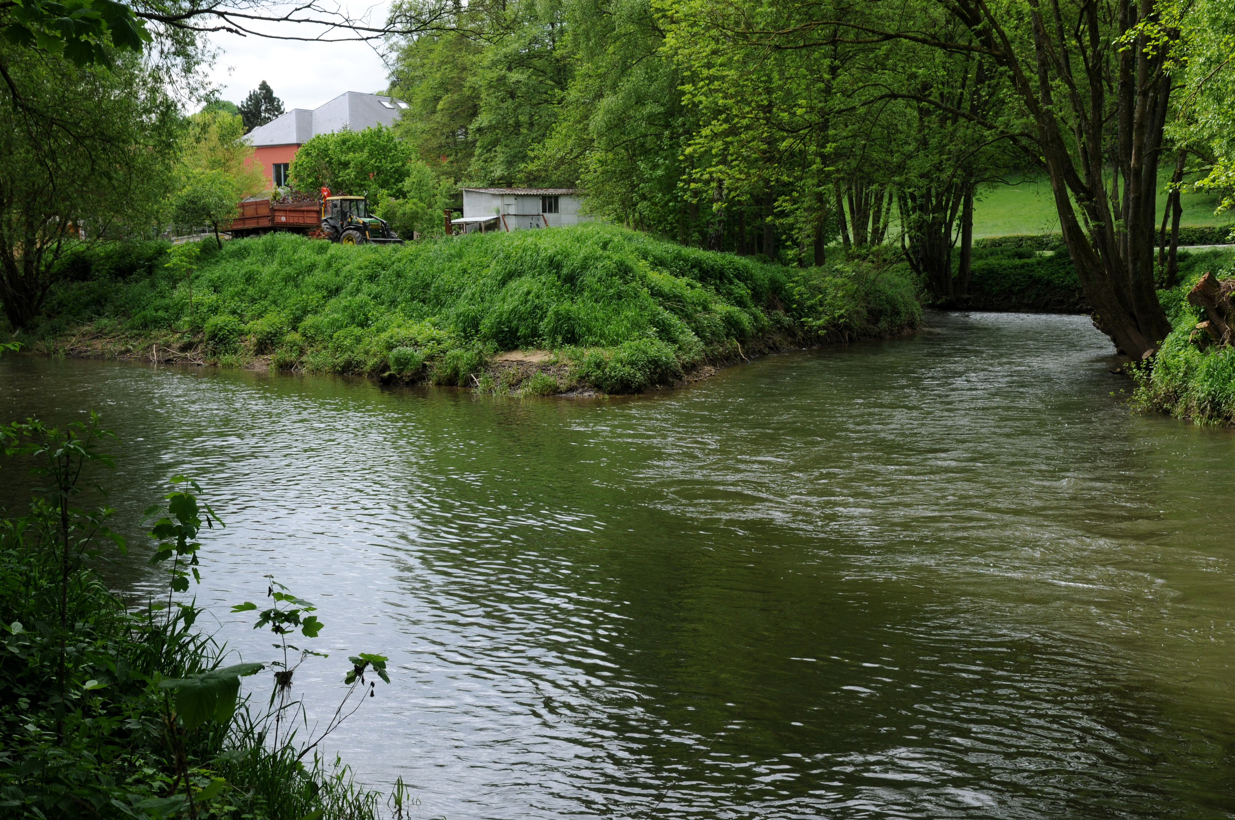 Schierenermillen un der Uelzecht.